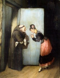 La Visita , Pascual Ortega Portales (1839-1899)